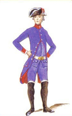 Allievo della Nunziatella, 1787